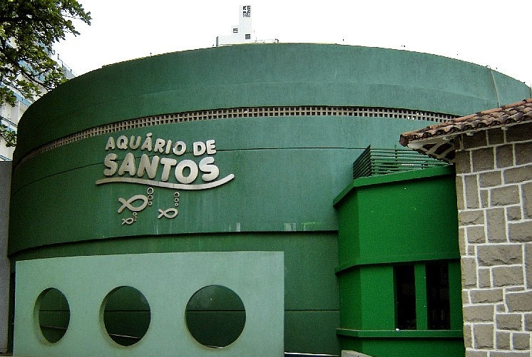 Aquário Municipal de Santos